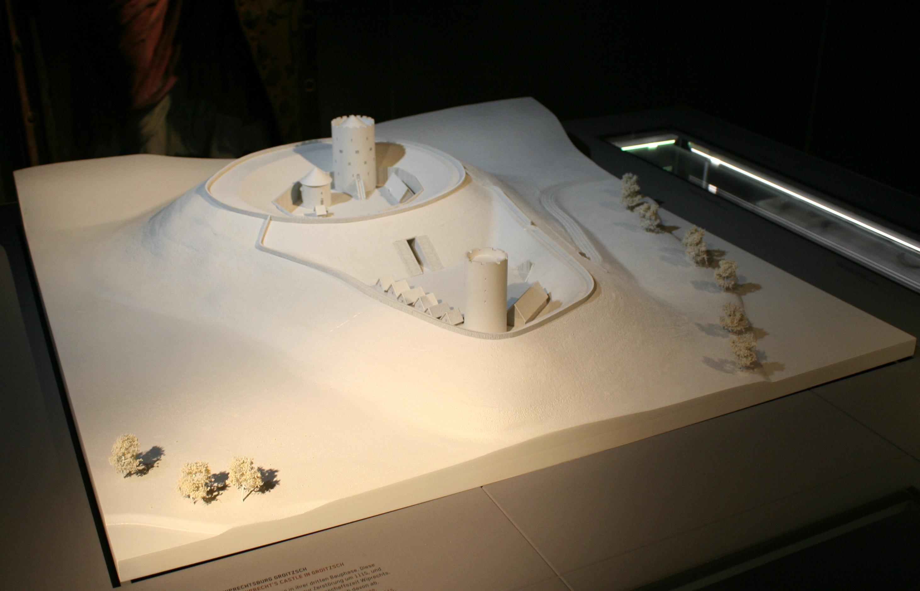 Modell der Wiprechtsburg Groizsch; Staatliches Museum für Archäologie Chemnitz